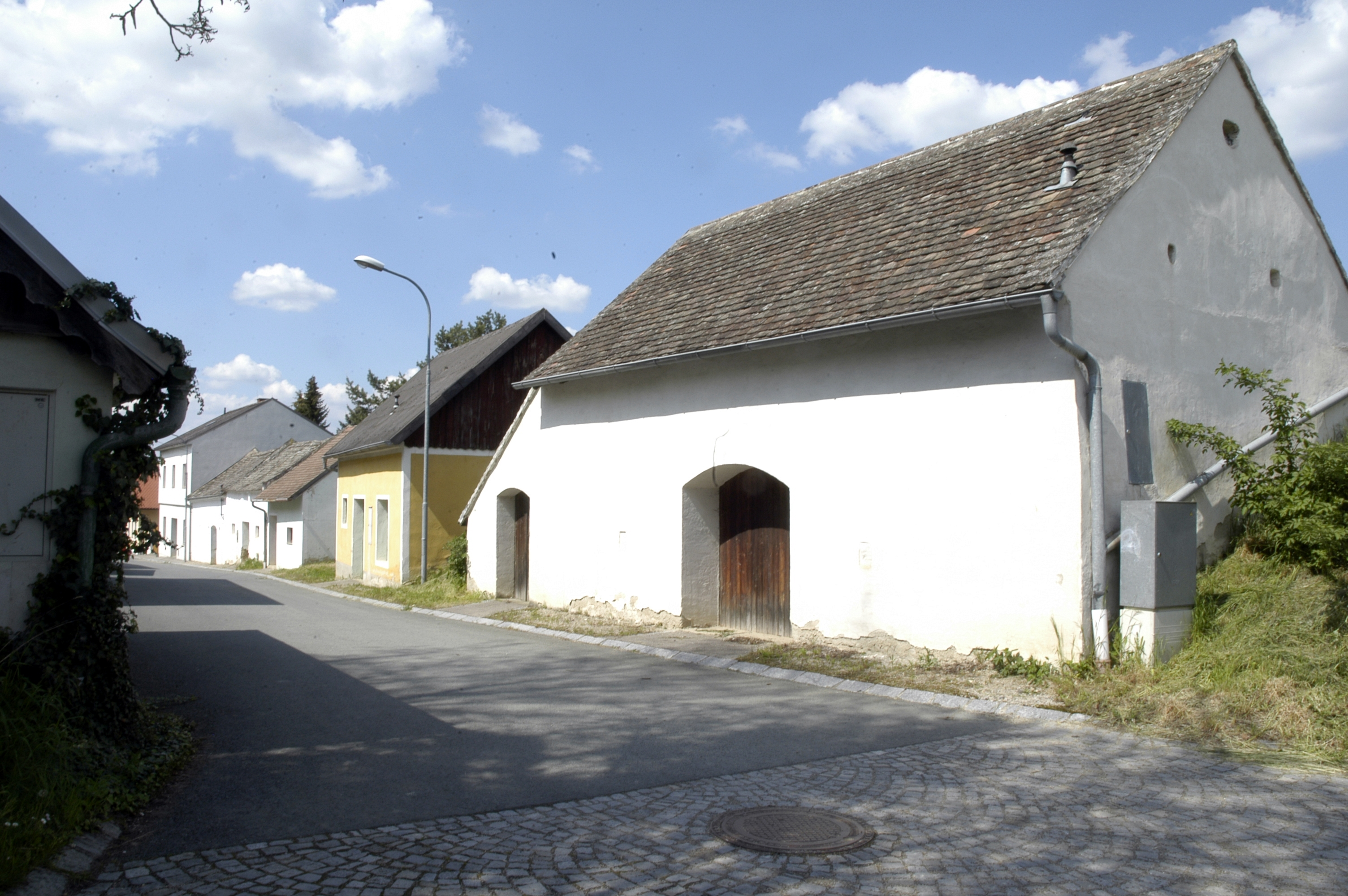 Kellergasse Mittergrabern, Gemeinde Grabern